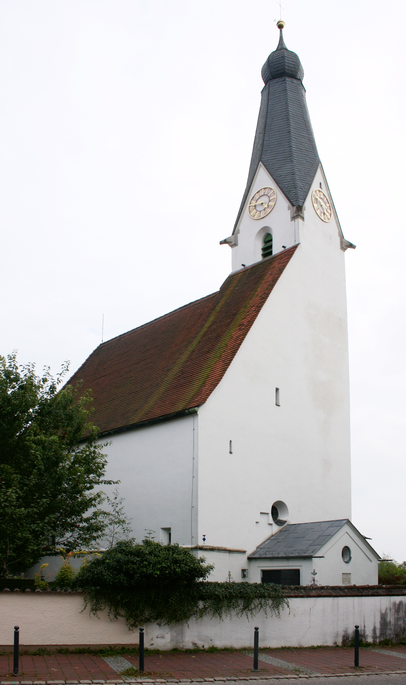 Heilig Geistkirche in Pullach im Isartal